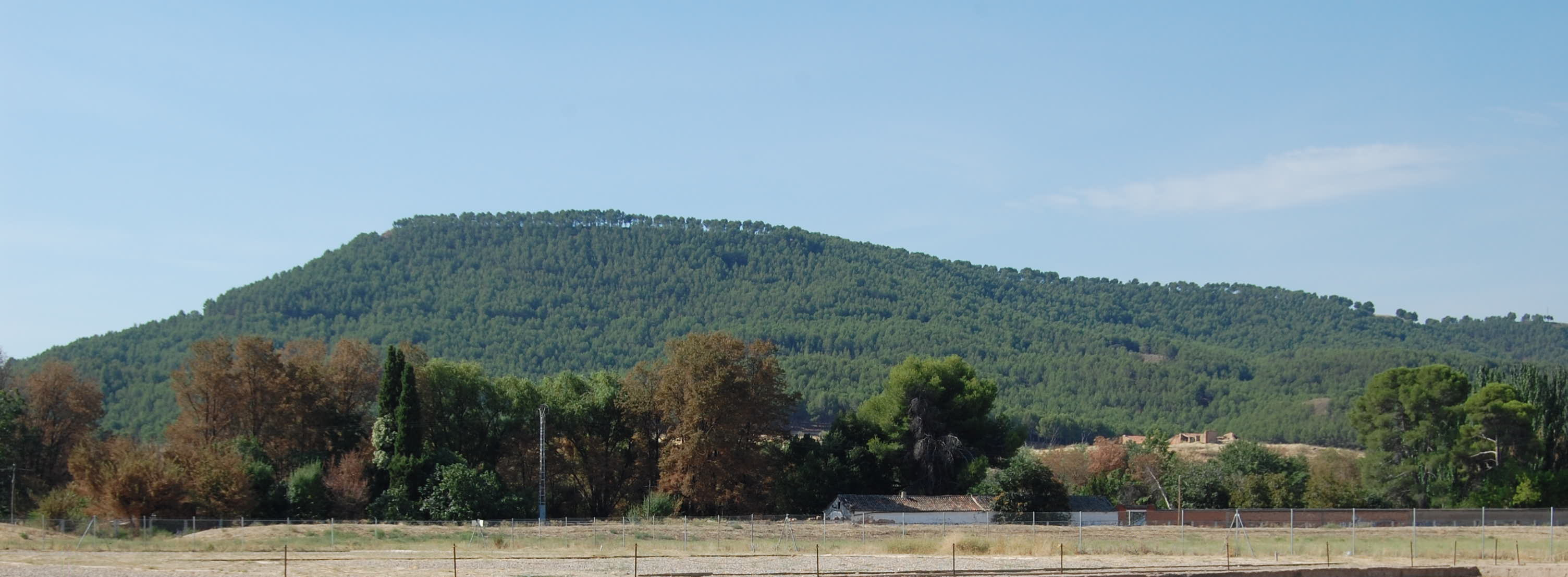 Ladera noreste del Cerro del Viso (o de San Juan del Viso) vista desde Alcalá de Henares (Comunidad de Madrid - España). This is a photography of a Special Area of Conservation in Spain with the ID: ES3110001. Natura2000 entry, EEA entry